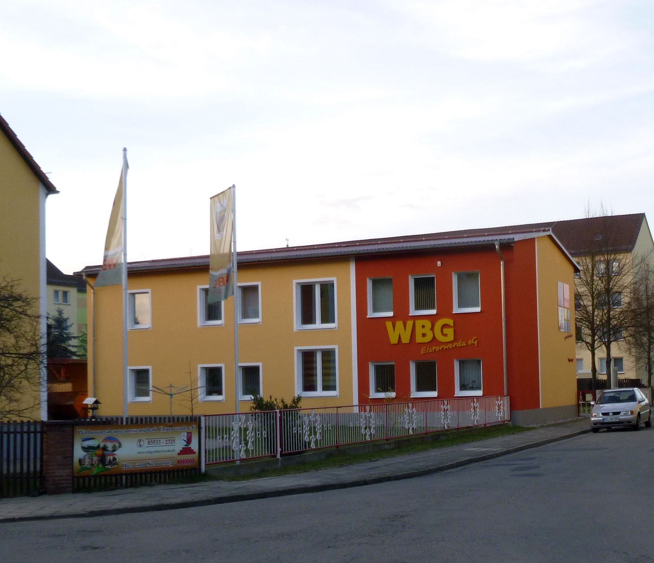 Verwaltung AWG im Elsterwerda Stadtteil Elsterwerda-West